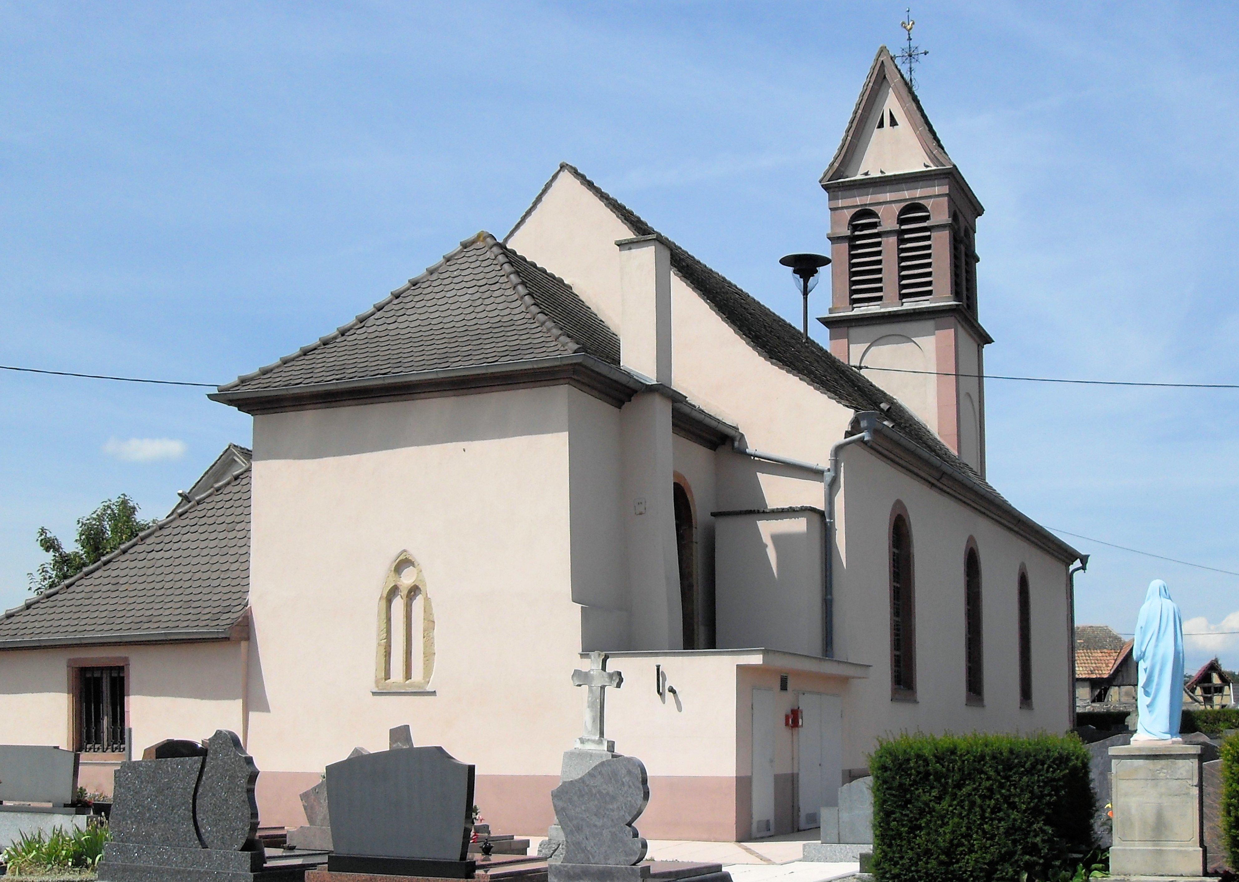 L'église Saint-Étienne à Nambsheim